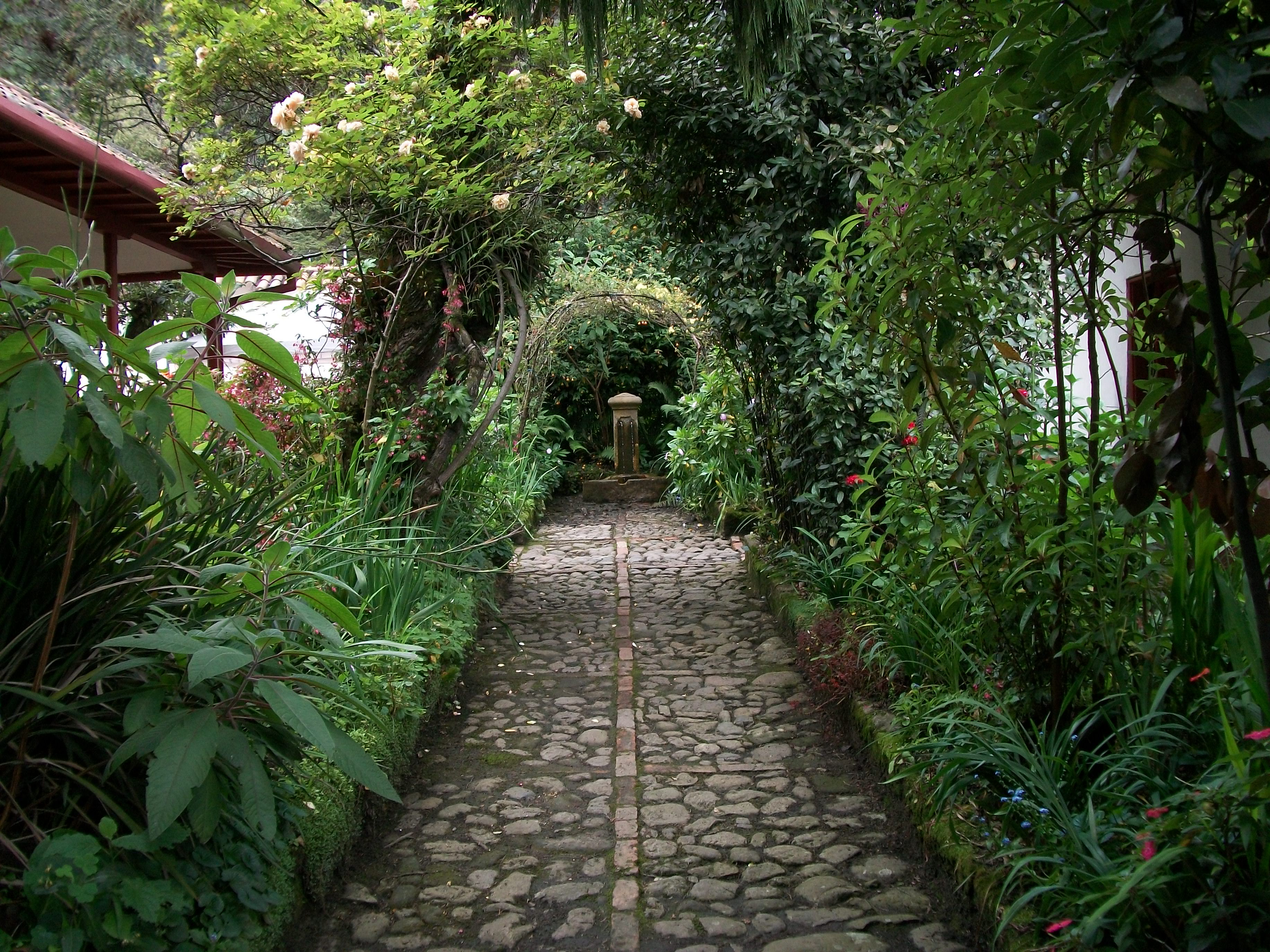 Arcos vegetales en el jardín de la Quinta de Bolívar.